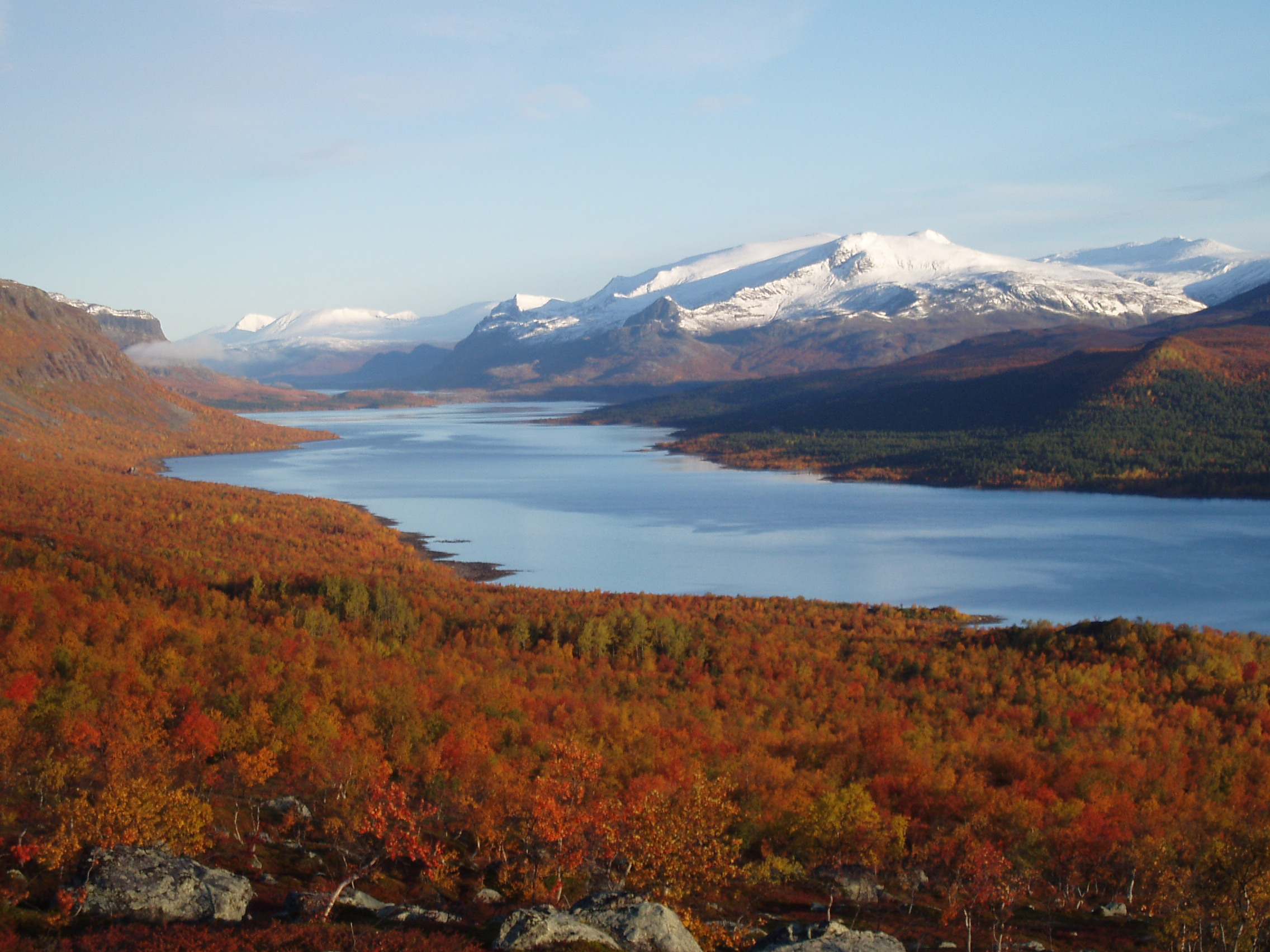 En fin höst vy mot Stora Sjöfallet med sjön Langas och Kierkau på vänster sida